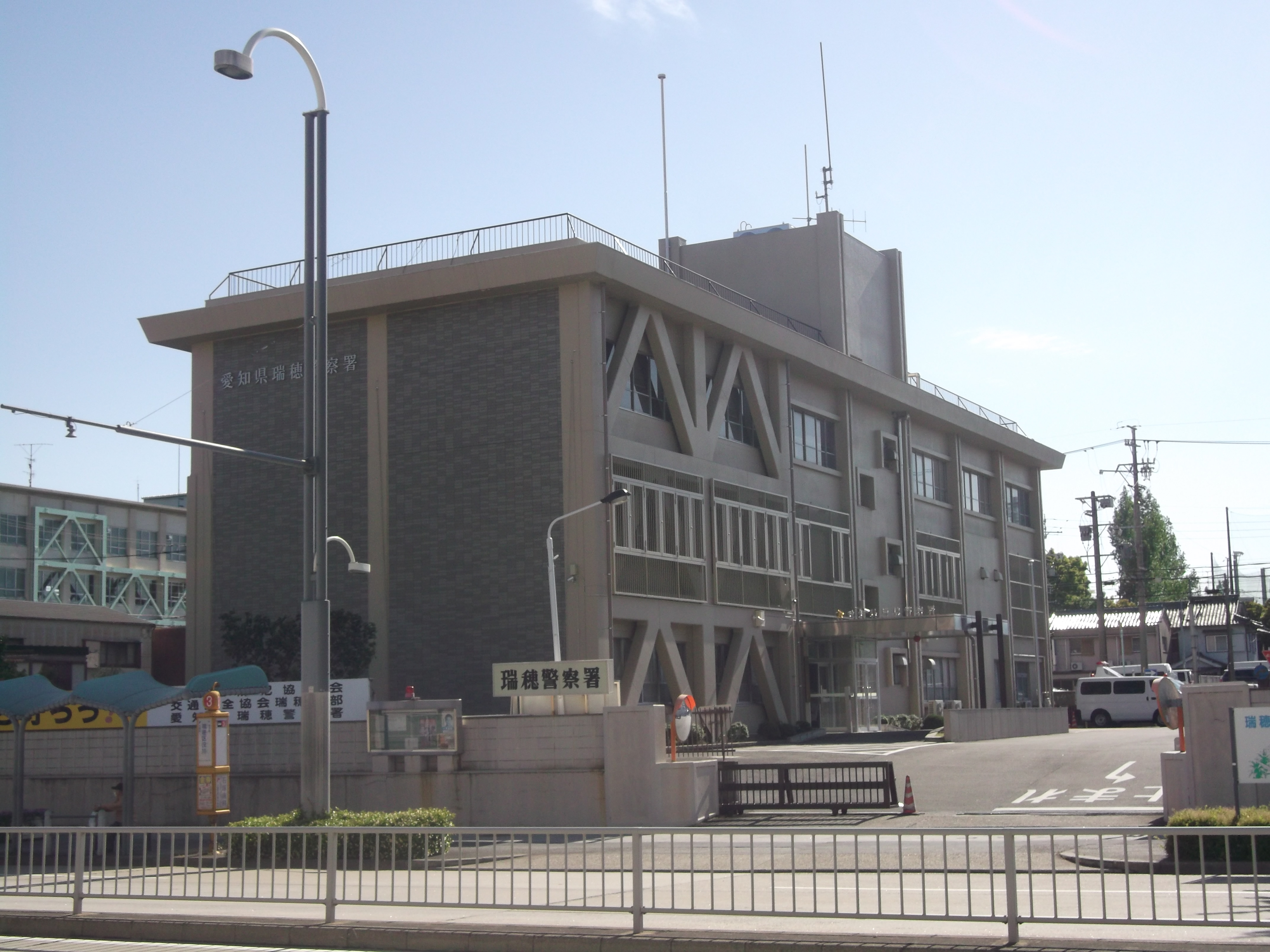 名古屋市瑞穂区瑞穂通の愛知県警瑞穂警察署を東側公道より写す